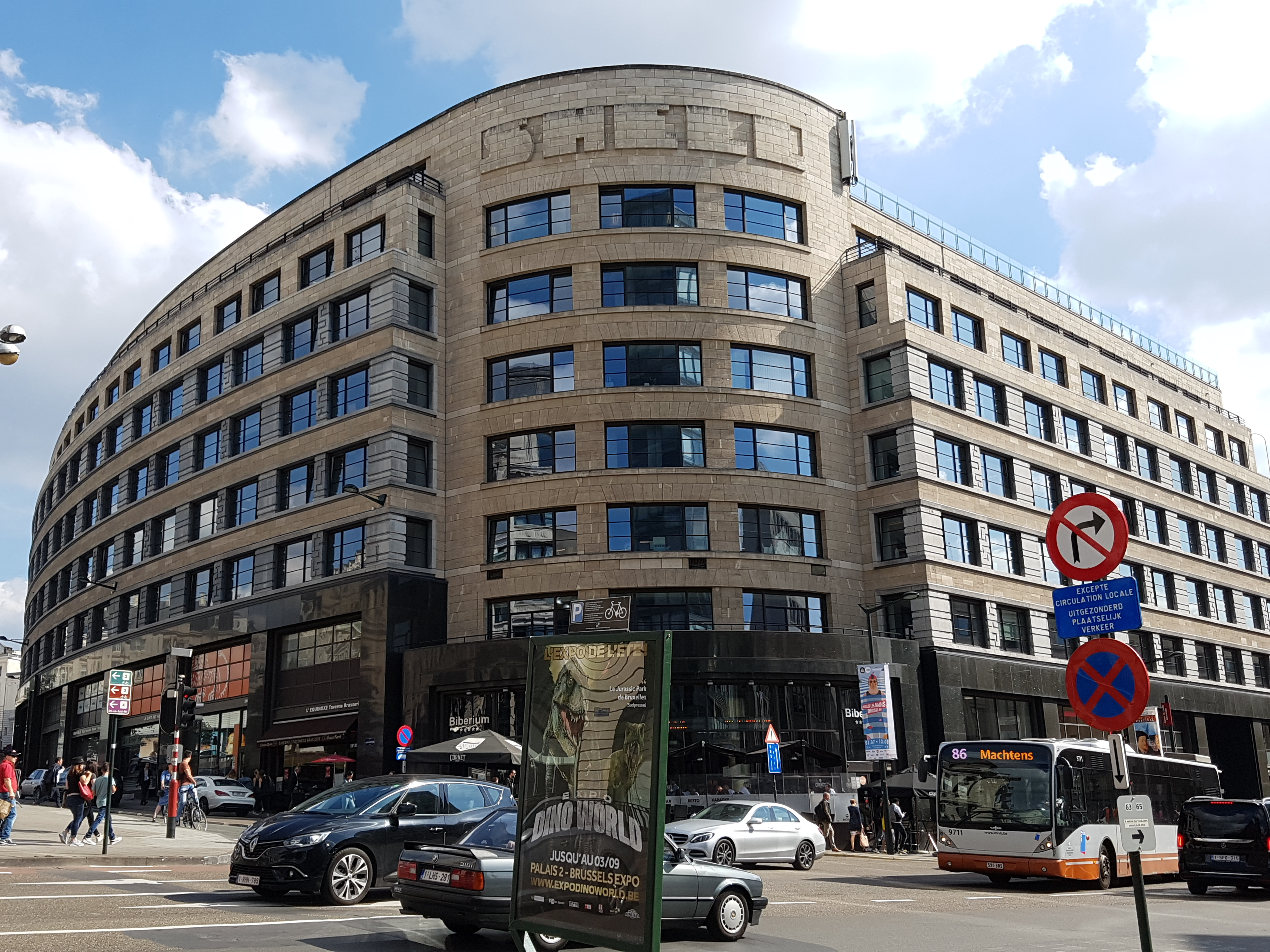 Immeuble Shell, cantersteen à Bruxelles